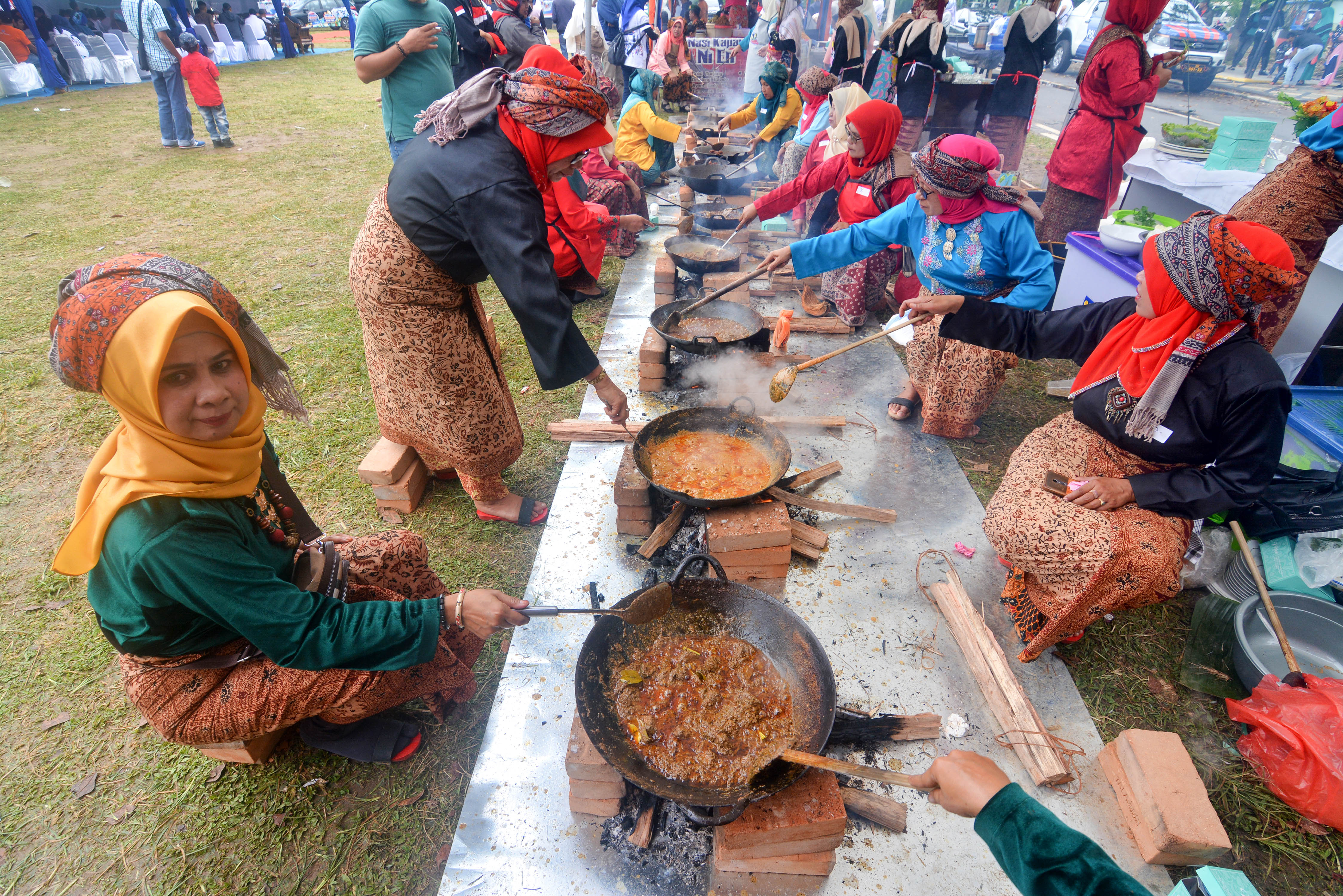 tradisi memasak rendang sering kali diadakan, karna masakan rendang ini sangat terkenal akan kelezatannya yang di akui oleh dunia, rendang masakan terlezat di dunia, yang berasal dari daerah sumatra barat